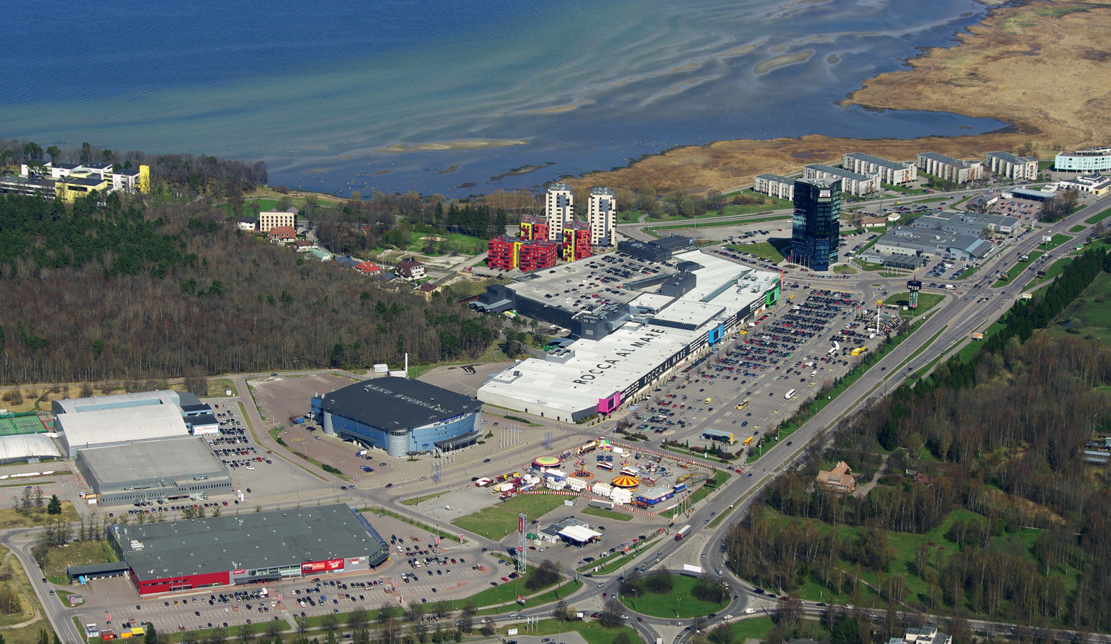 Õhuvaade Haabersti asumile